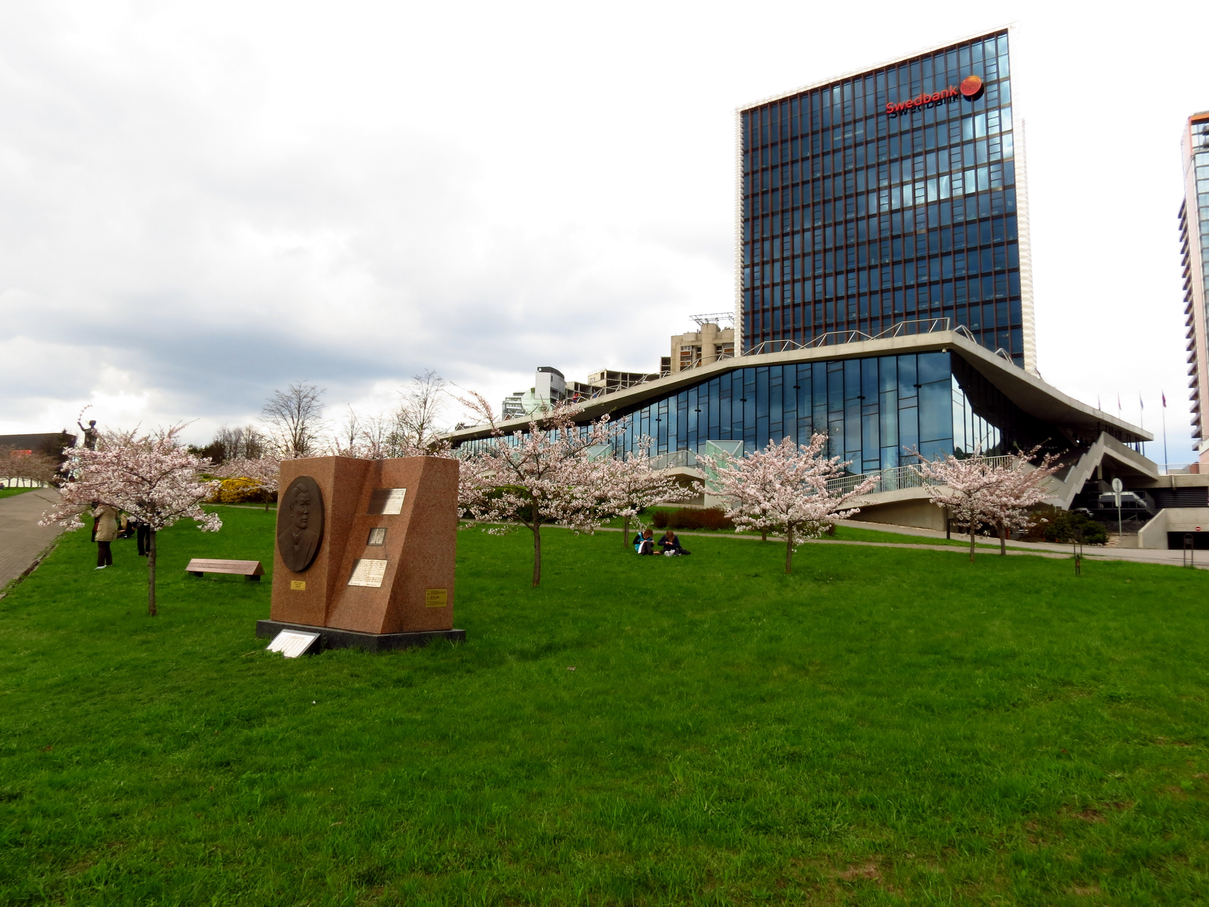 Vue de Vilnius.